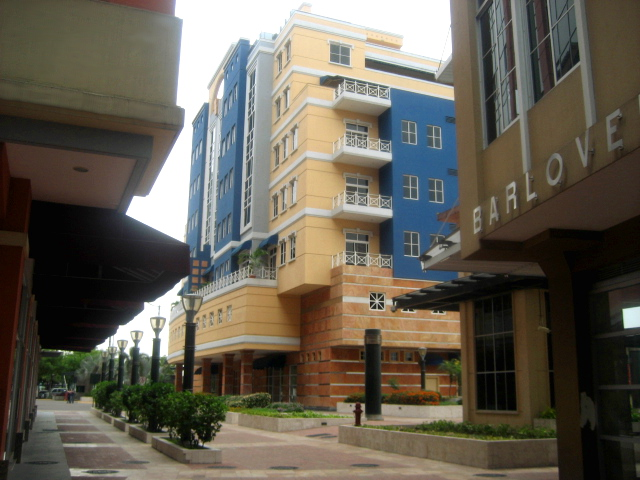 Edificio Sotavento en Puerto Santa, Guayaquil